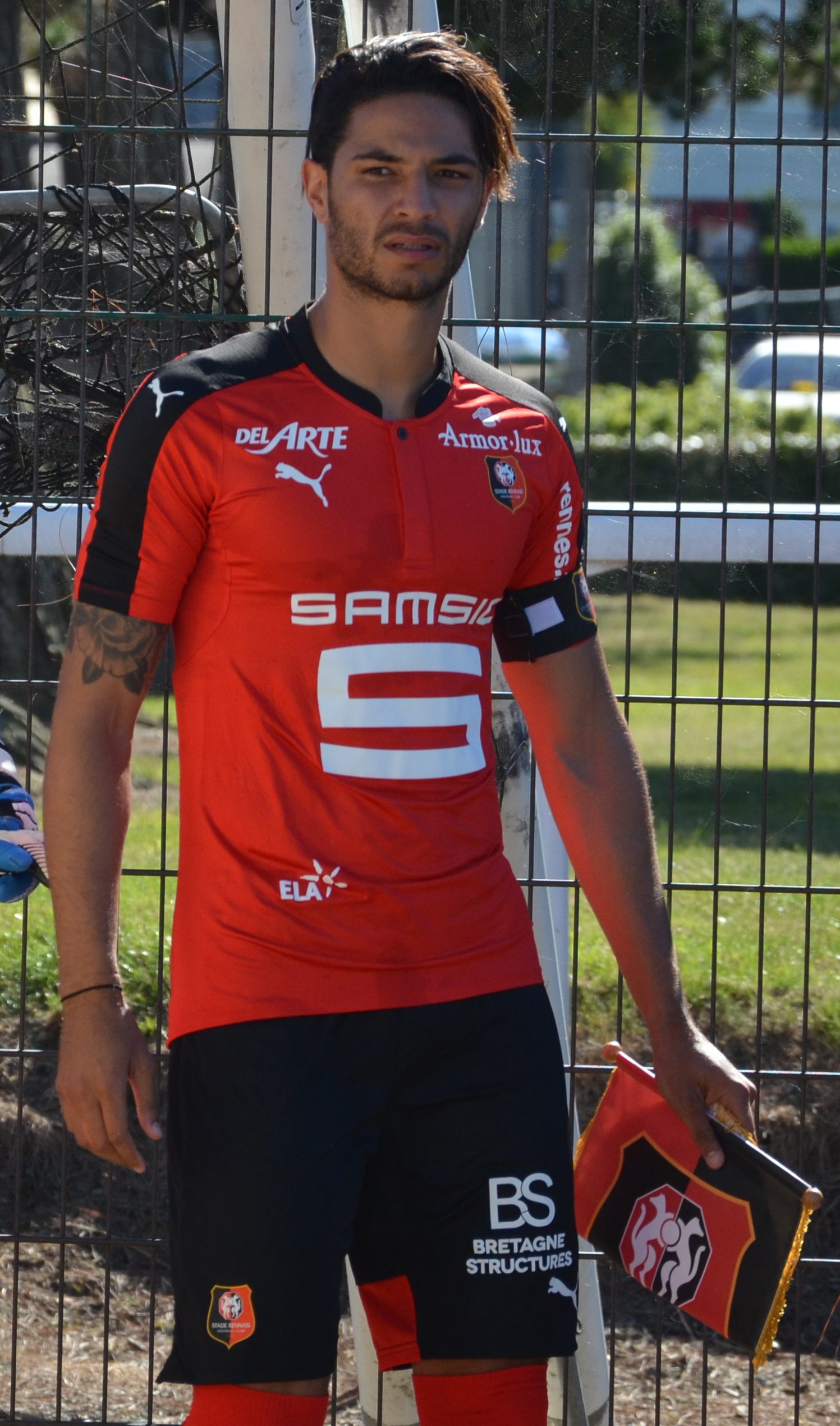 Photographie prise lors du match opposant le Stade rennais à l'USM Alger en match amical au stade Paul-Audrin de Dinard le 16 juillet 2016. Ici, Paul Nardi et Pedro Mendes.